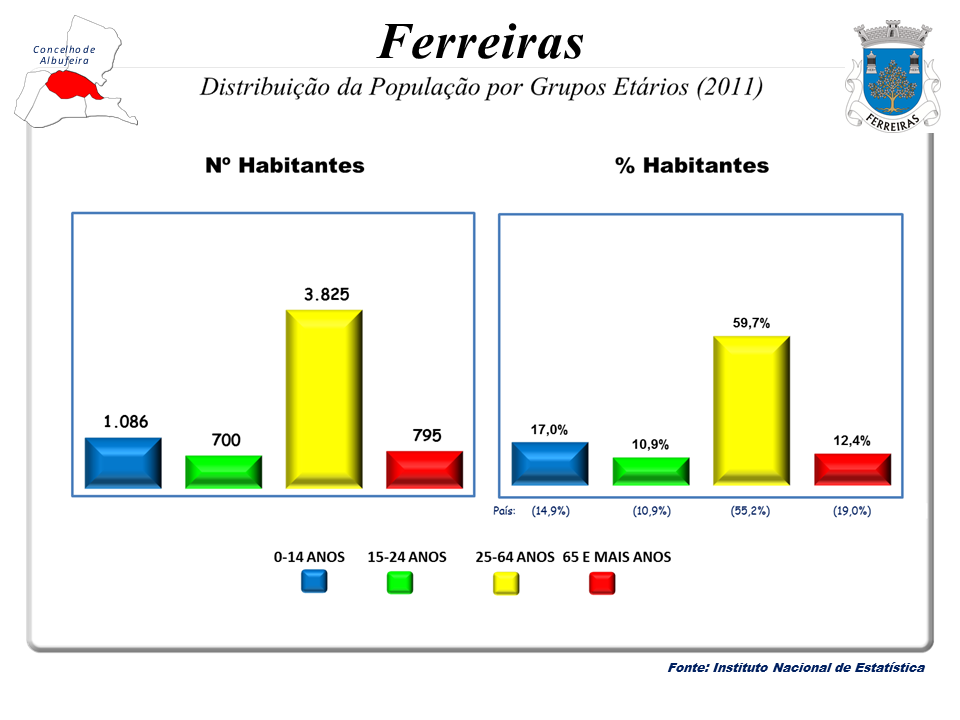 Censos 1864/2011